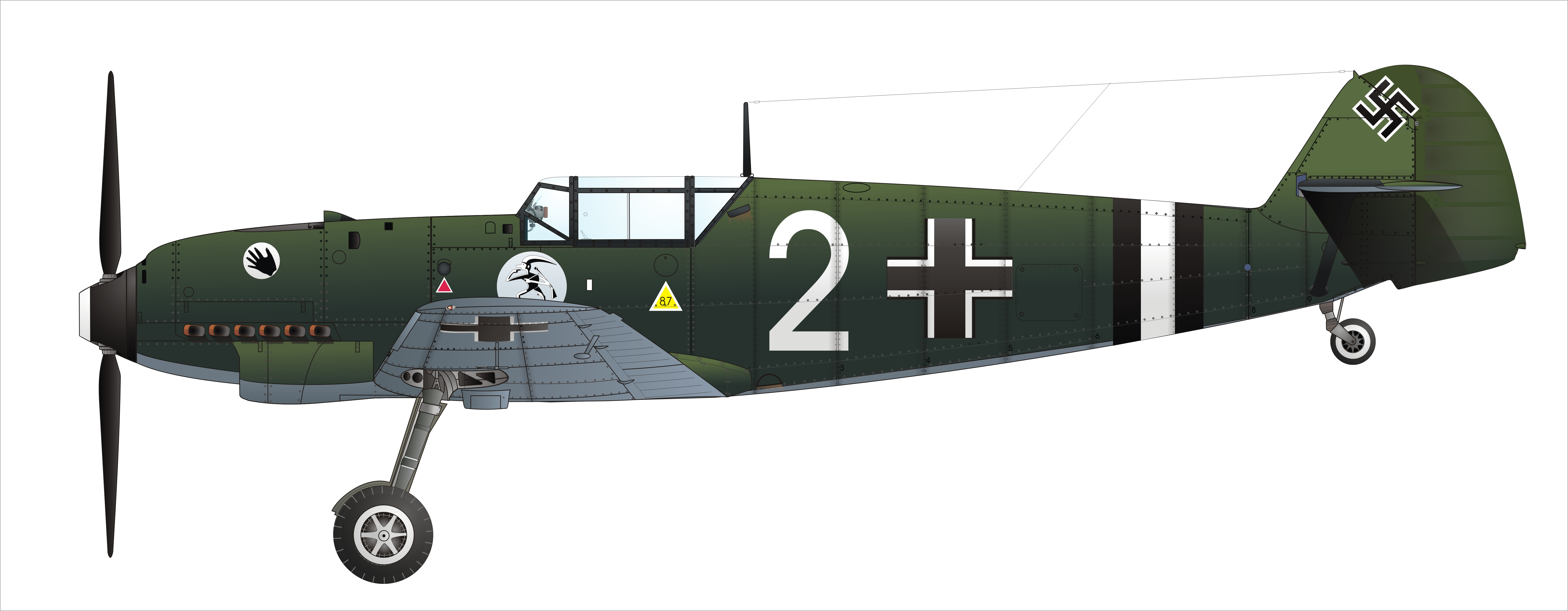 Bf 109 D-1, 1/JGr. 102 (I/ZG 2)